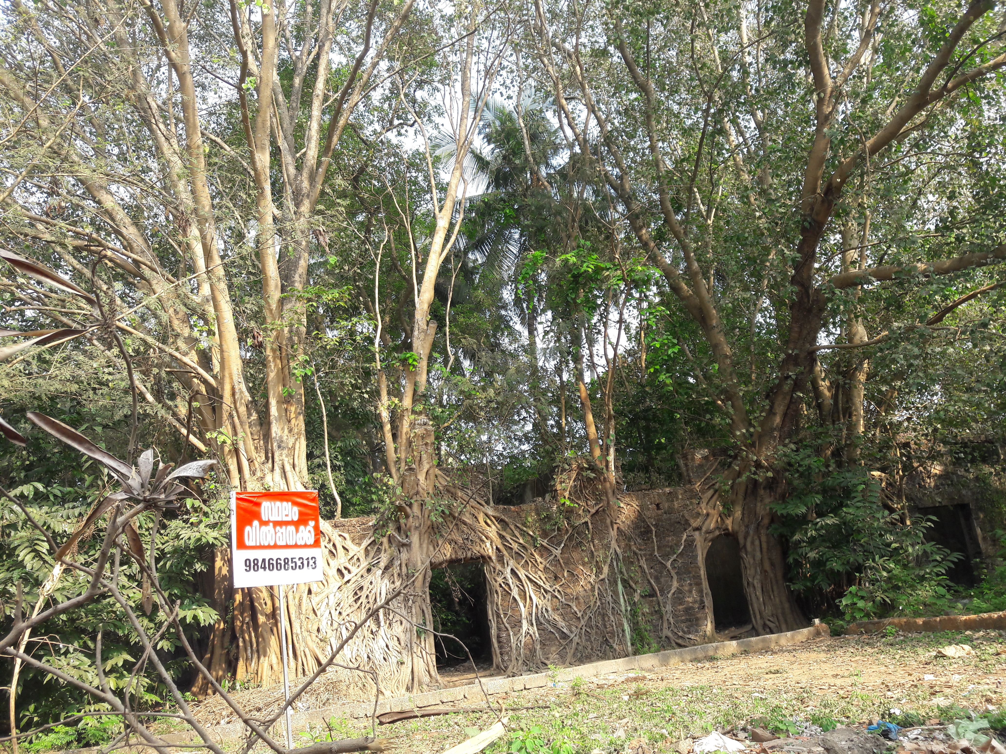 മലപ്പുറം ജില്ലയിലെ പൊന്നാനി കോടതിപ്പടിയില്‍ പഴയ കെട്ടിടത്തിന്‍റെ മുകളില്‍ വളരുന്ന അരയാല്‍ മരങ്ങള്‍.